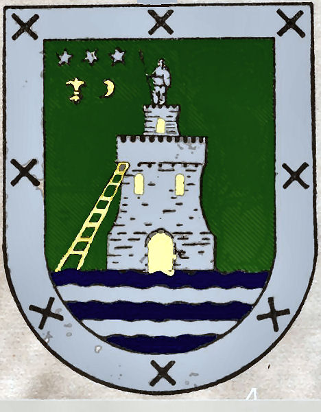 Escudo de armas del linaje Escalada, de Burgos (España)